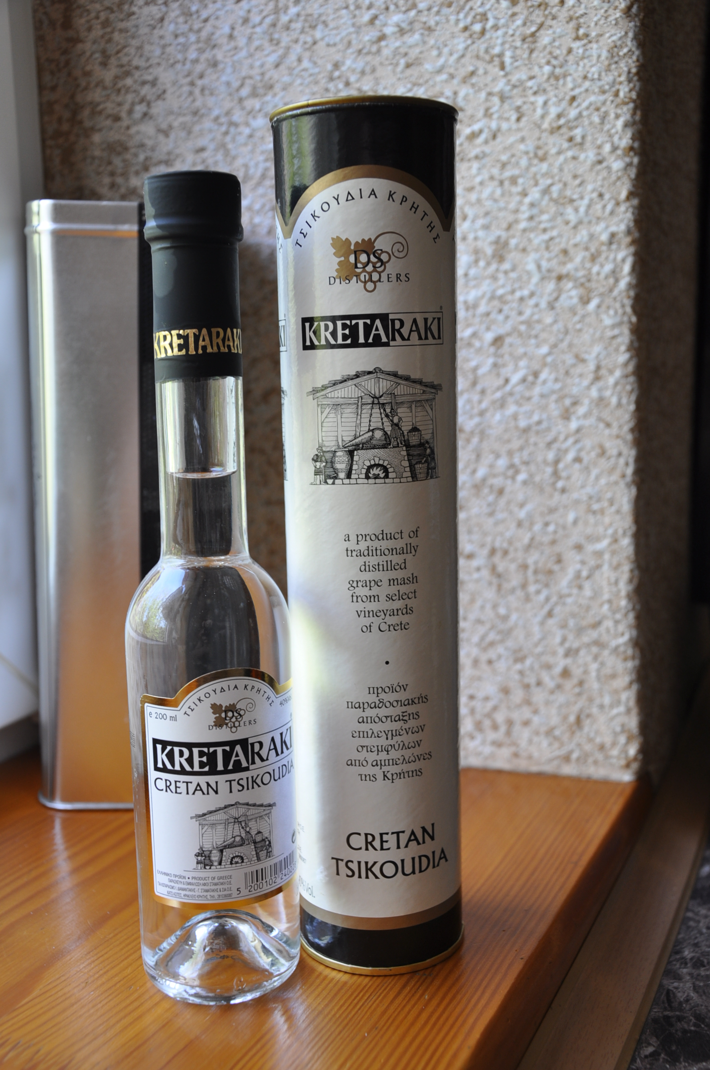 KretaRaki. 200ml. alk.40%